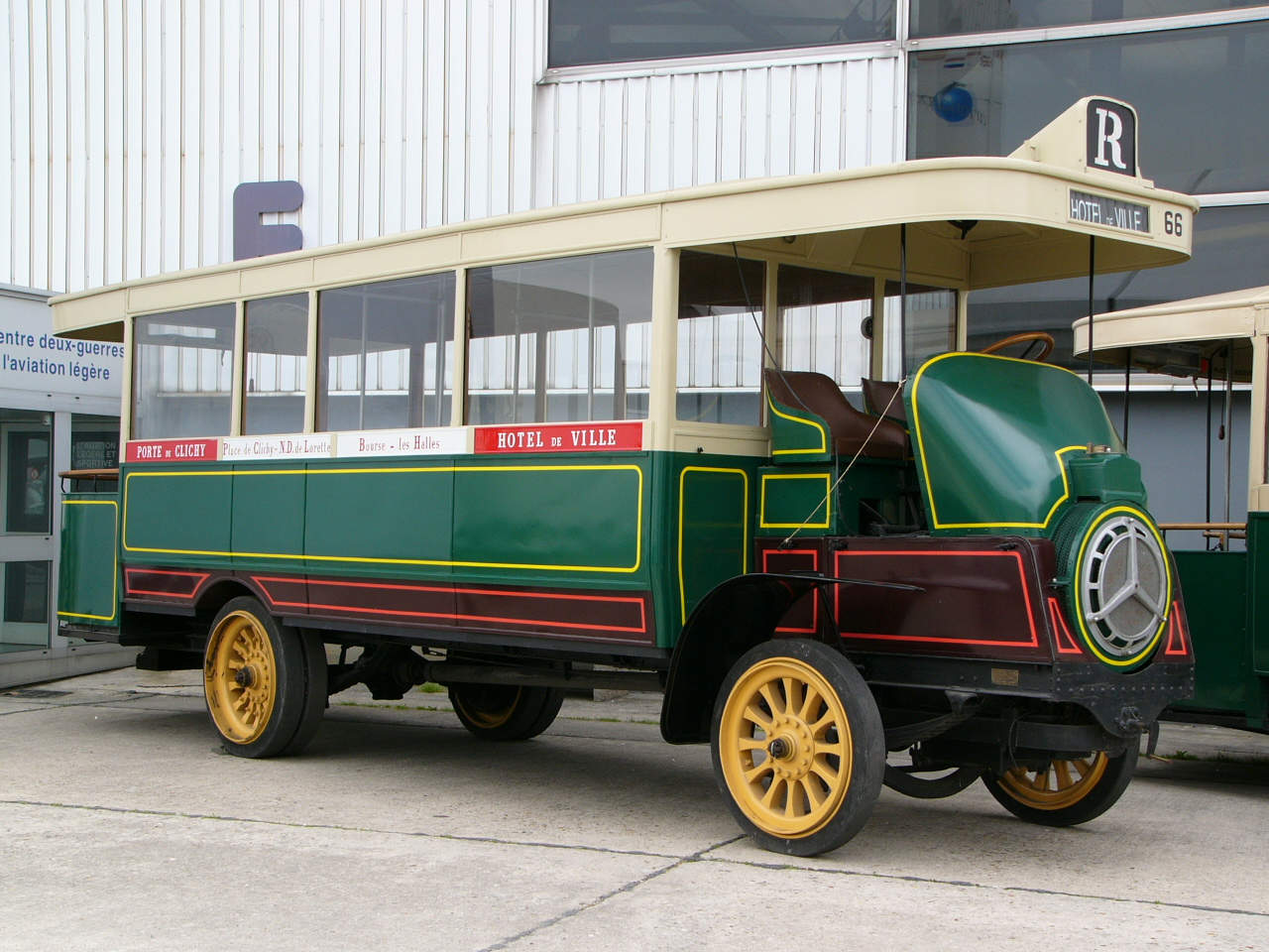 De Dion-Bouton Autobus CGO type H (devant le Musée de l'Air et de l'Espace du Bourget)